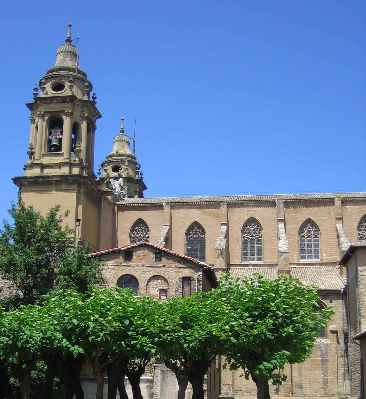 Eigenes Photo